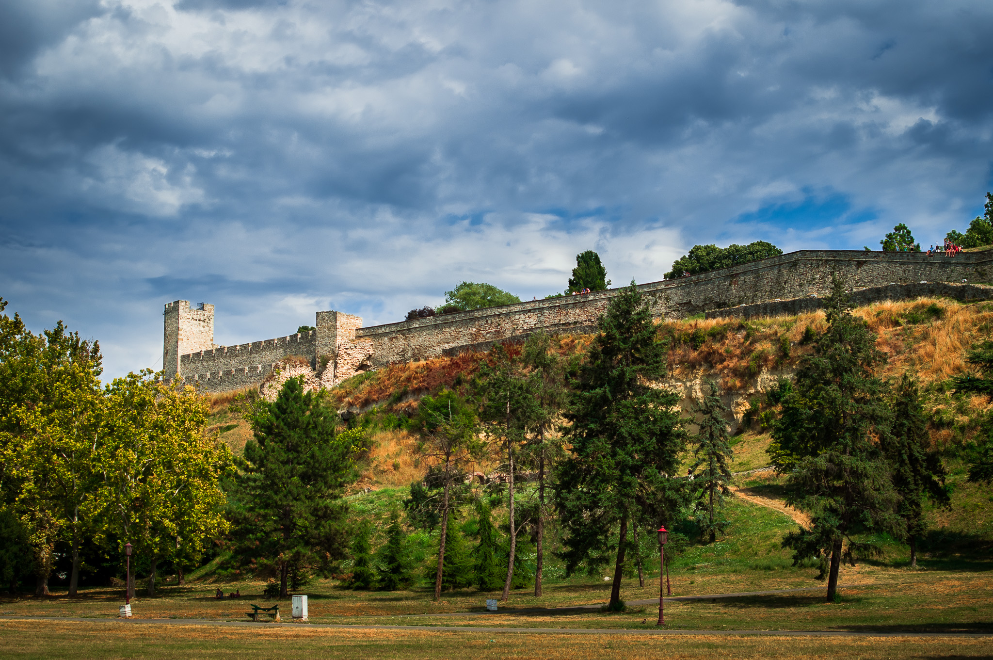 СП Pogled na Kalemgdan sa Istocne strane